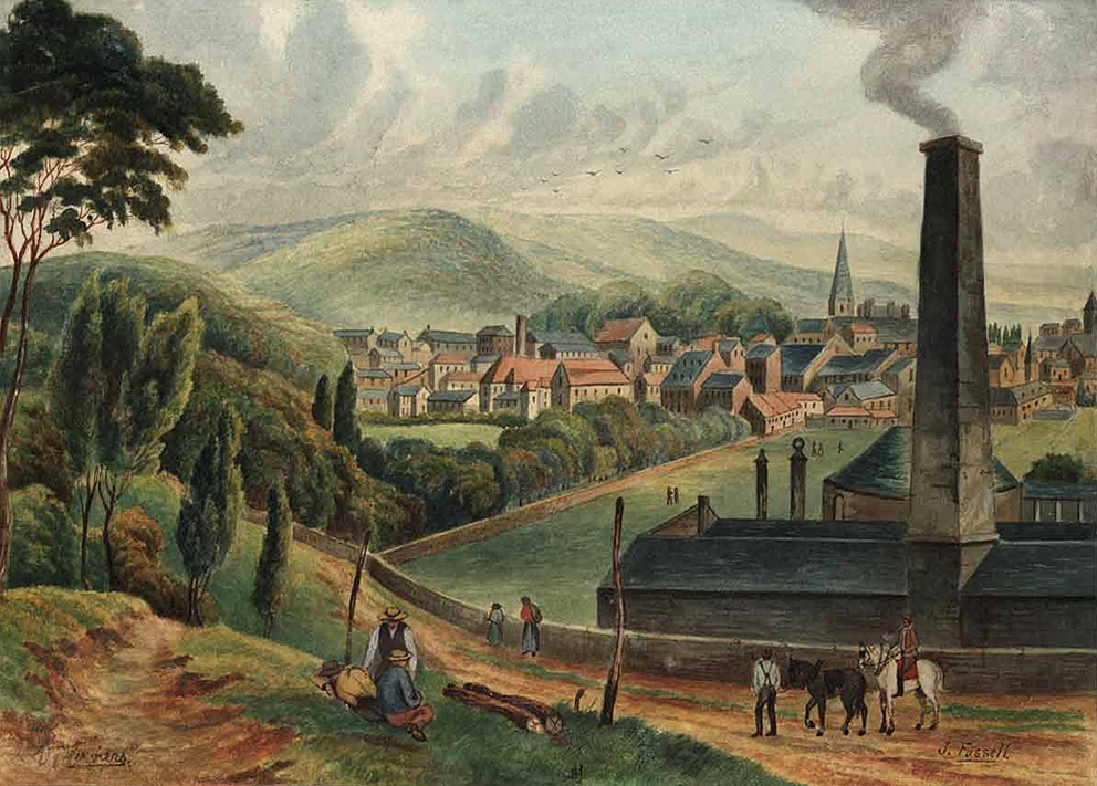 Vue de Verviers